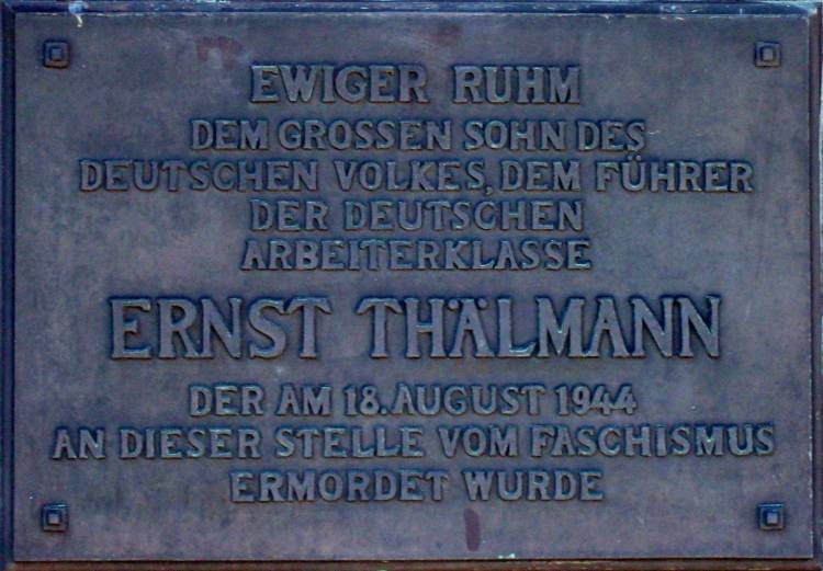 Gedenktafel für Ernst Thälmann am Krematorium